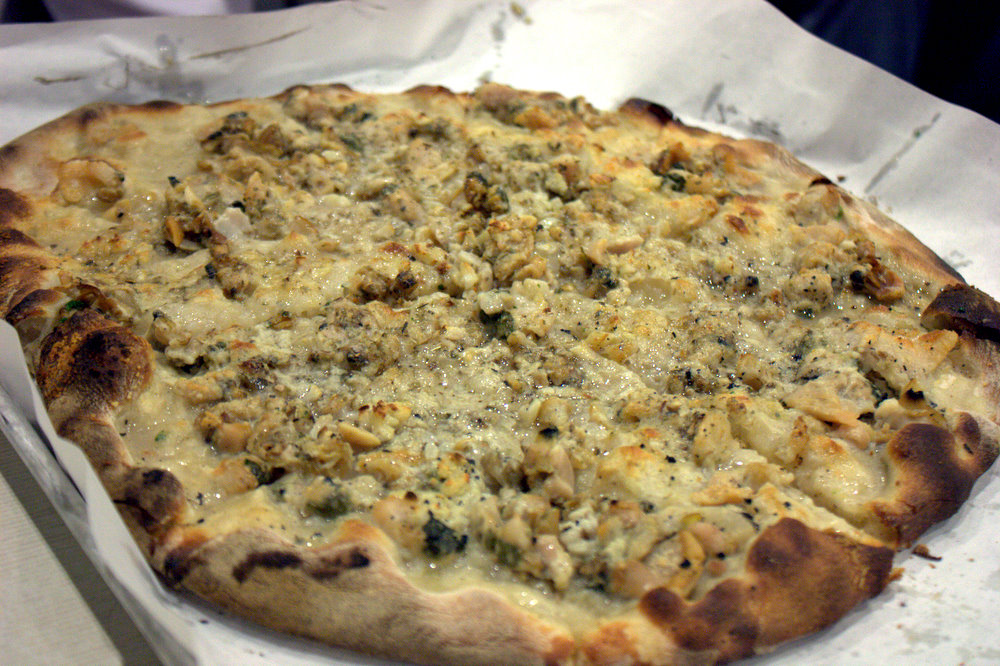 White clam pizza at Frank Pepe Pizzeria Napoletana in New Haven, Connecticut